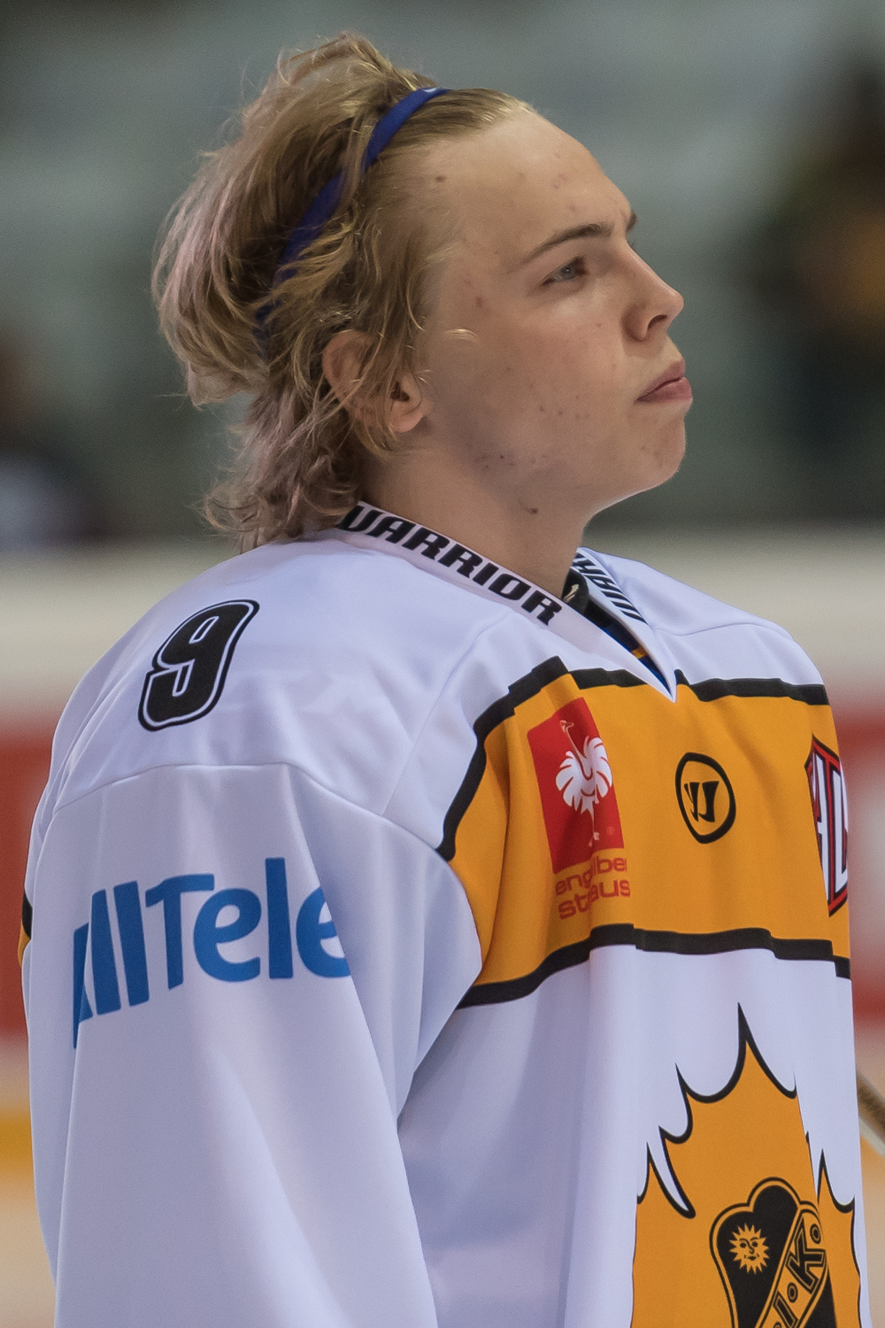 Champions Hockey League - Vienna Capitals vs Skelleftea AIK am 18.08.2016. Bild zeigt Tim Soderlund (Skelletea AIK).